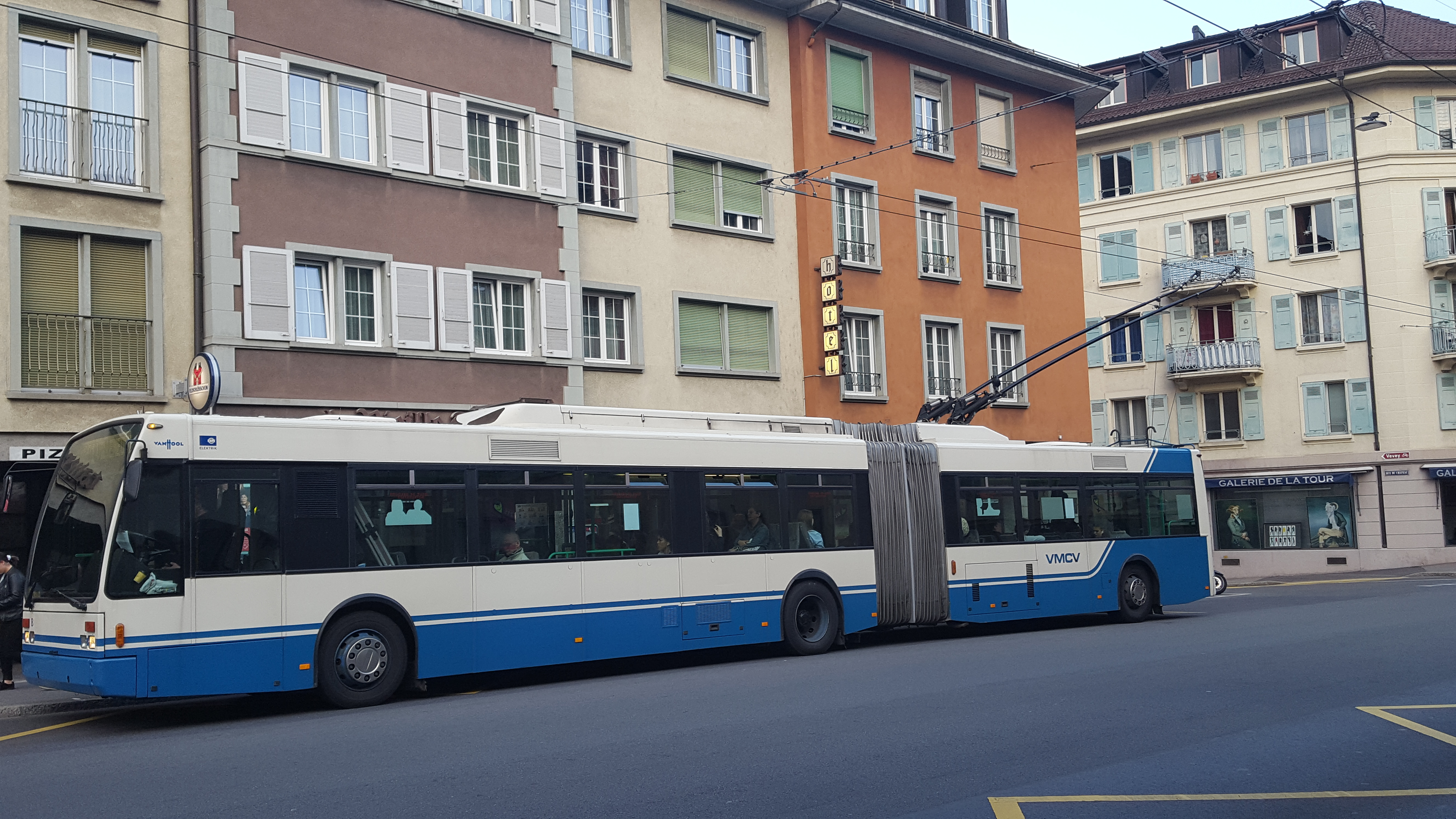 Oberleitungsbus aus La Tour de Peilz